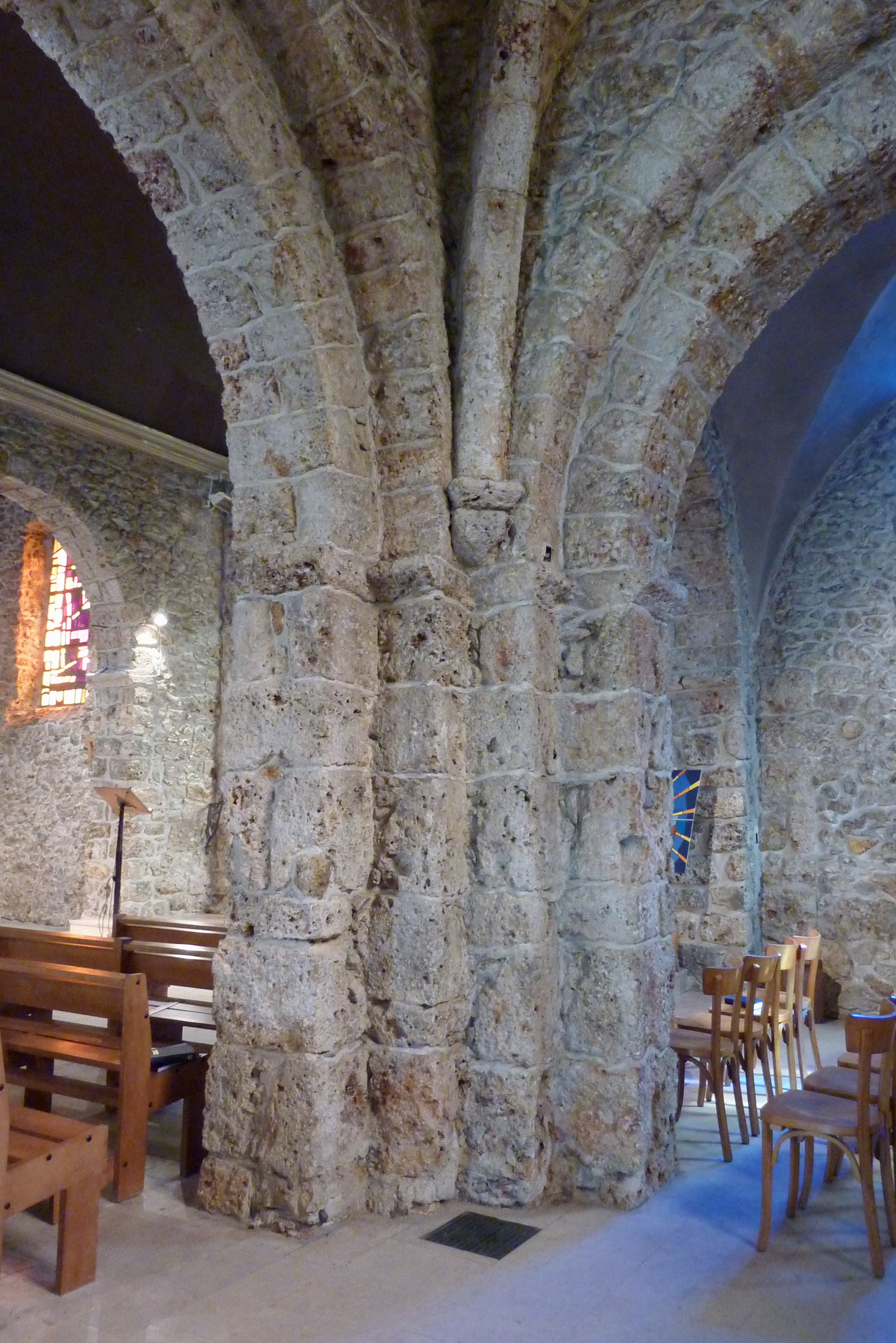 Katholische Pfarrkirche Saint-Matthieu in Bures-sur-Yvette im Département Essonne (Île-de-France), Pfeiler